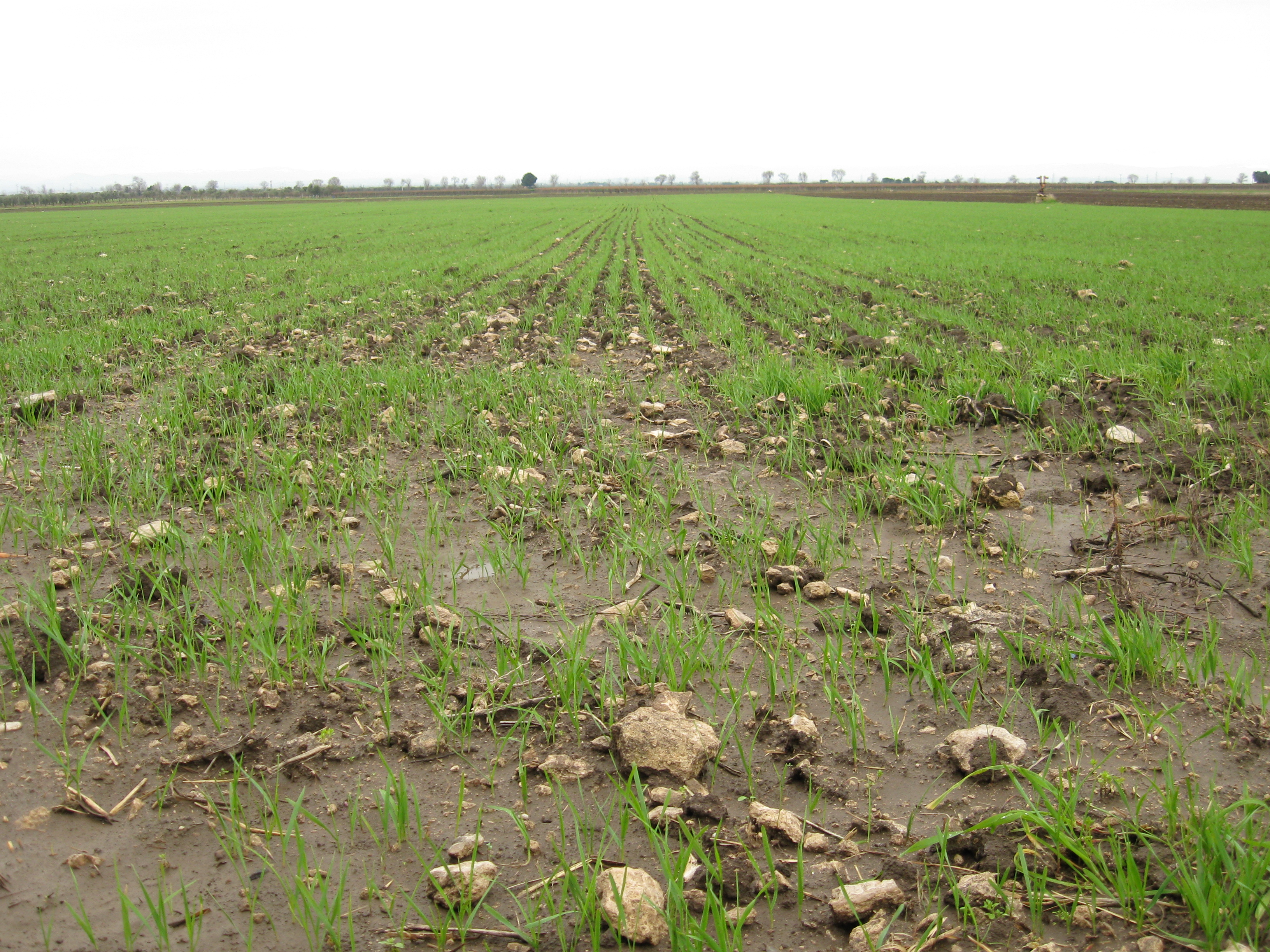 Grano duro nel mese di dicembre 2008, nella provincia di Foggia